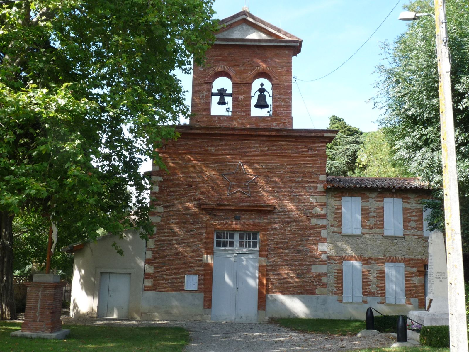 Eglise de Monestrol, Haute-Garonne, France